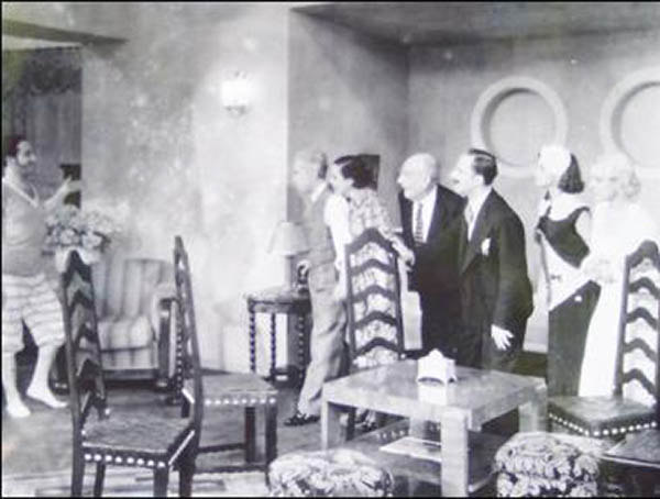 Cena do filme "O jovem Tataravô" (Luiz de Barros, 1936)